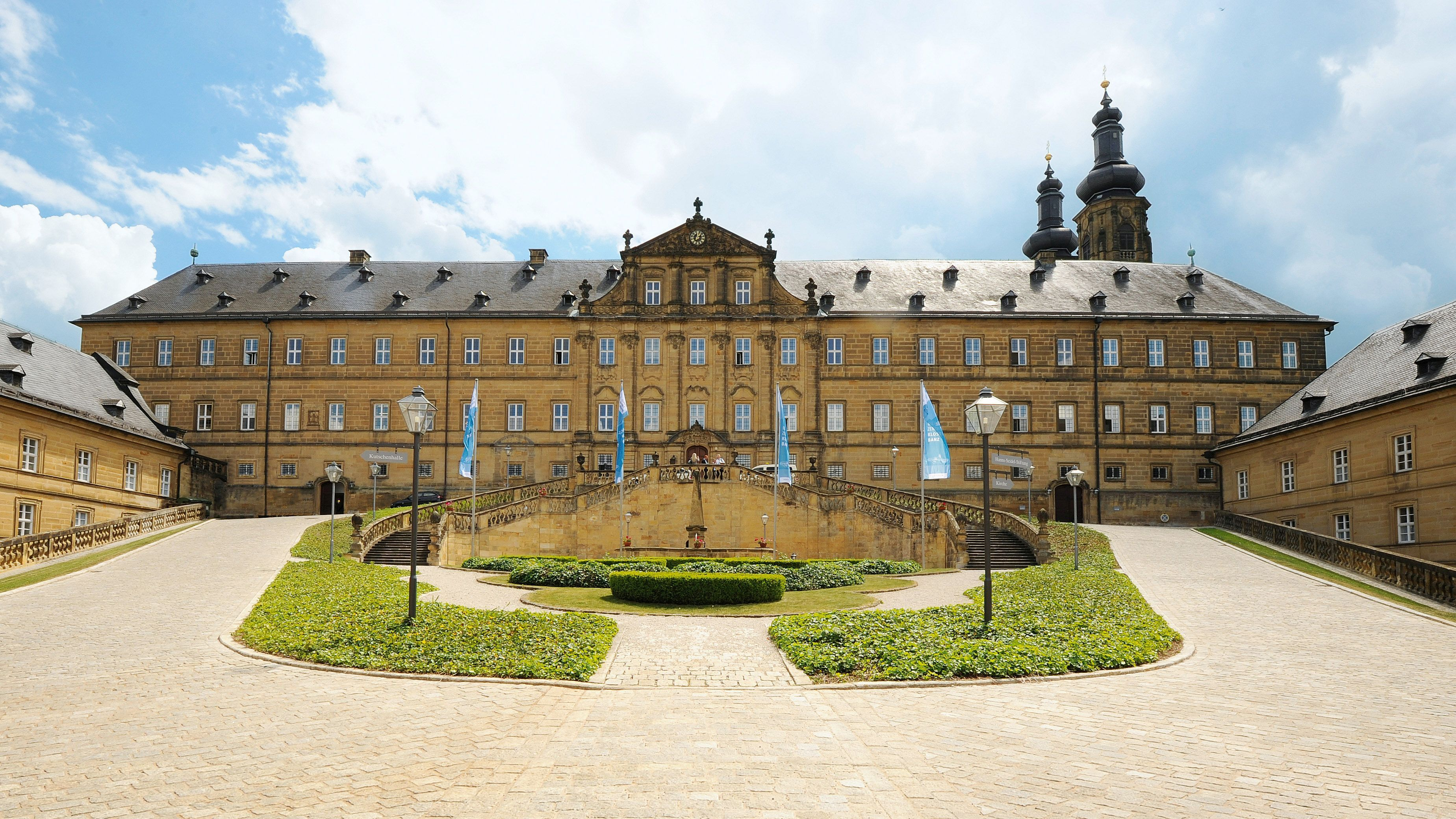 Innenhof Kloster Banz